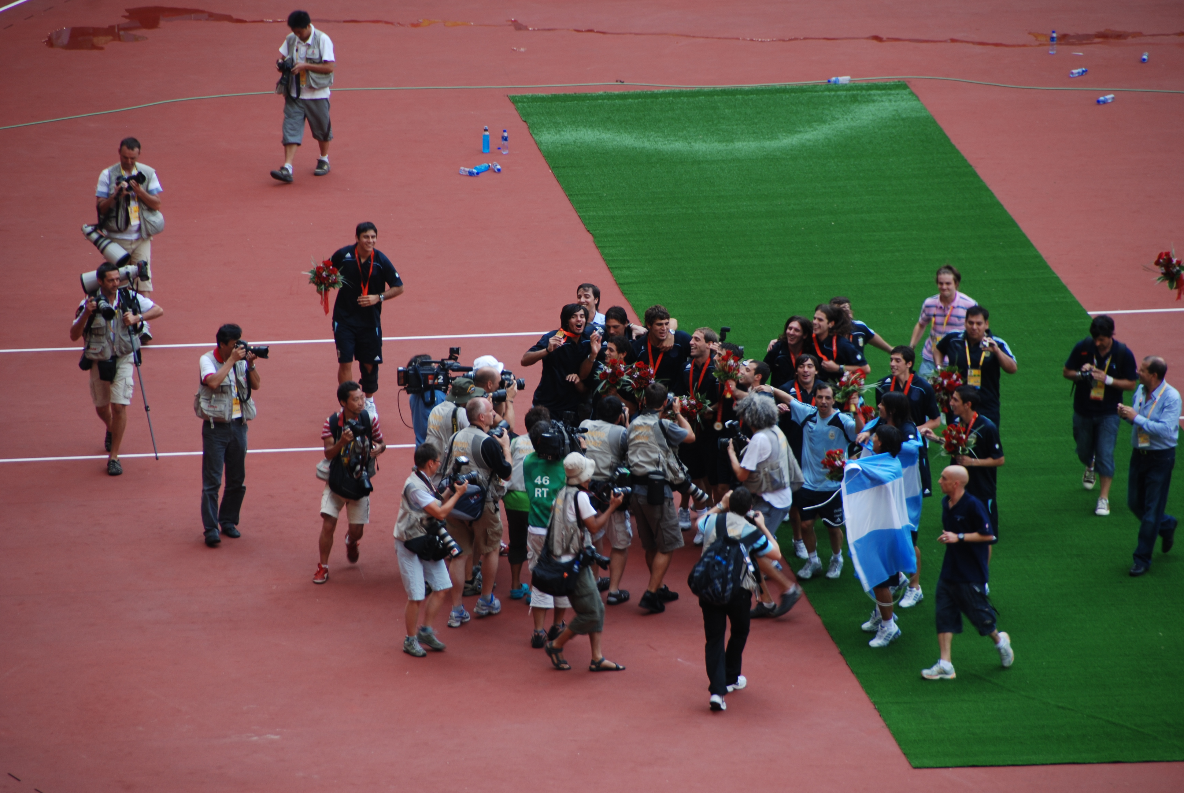 La selección de fútbol de Argentina, celebrando la medalla de oro en los Juegos Olímpicos Beijing 2008